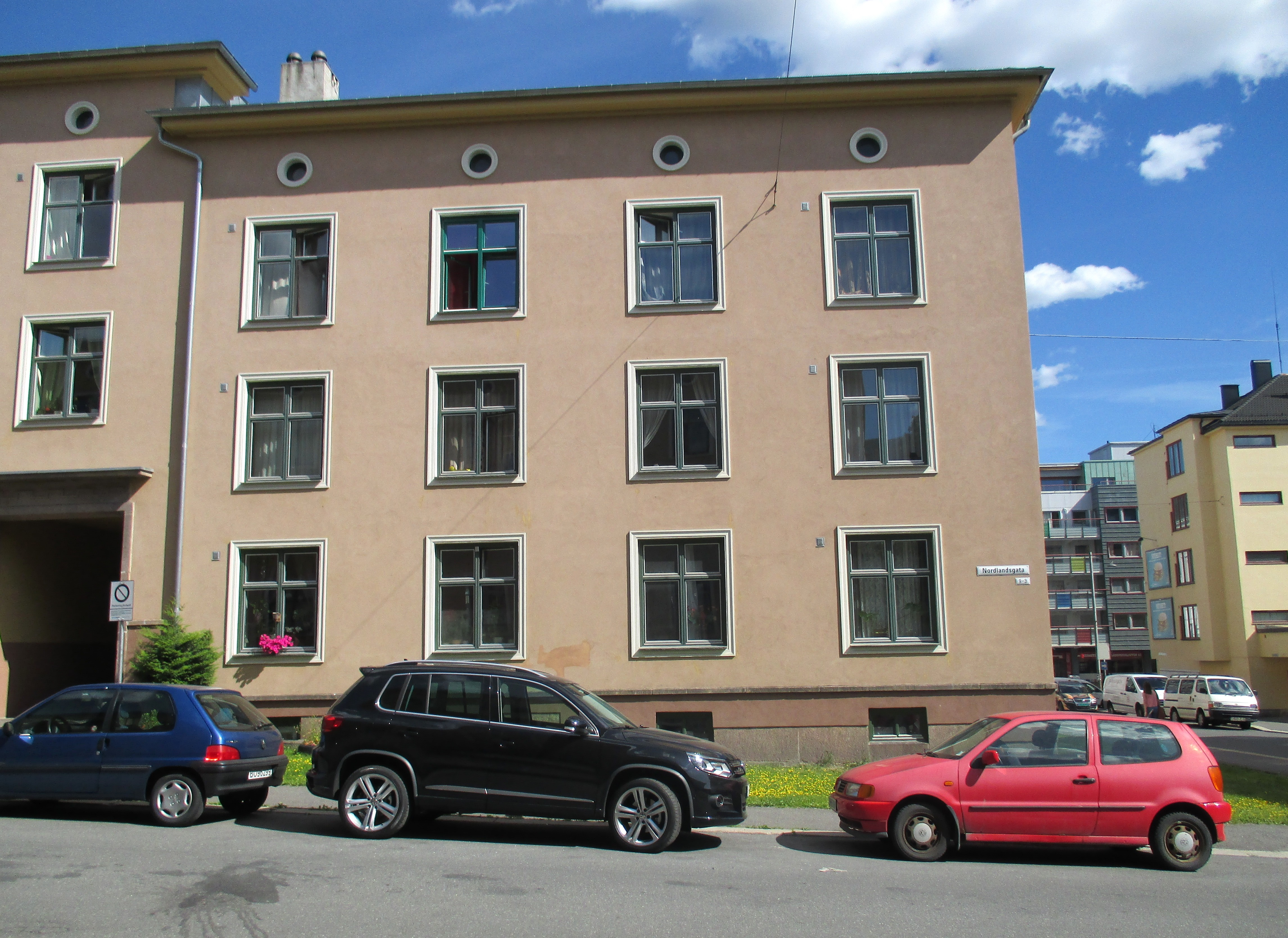 Nordlandsgata på Sandaker i Oslo